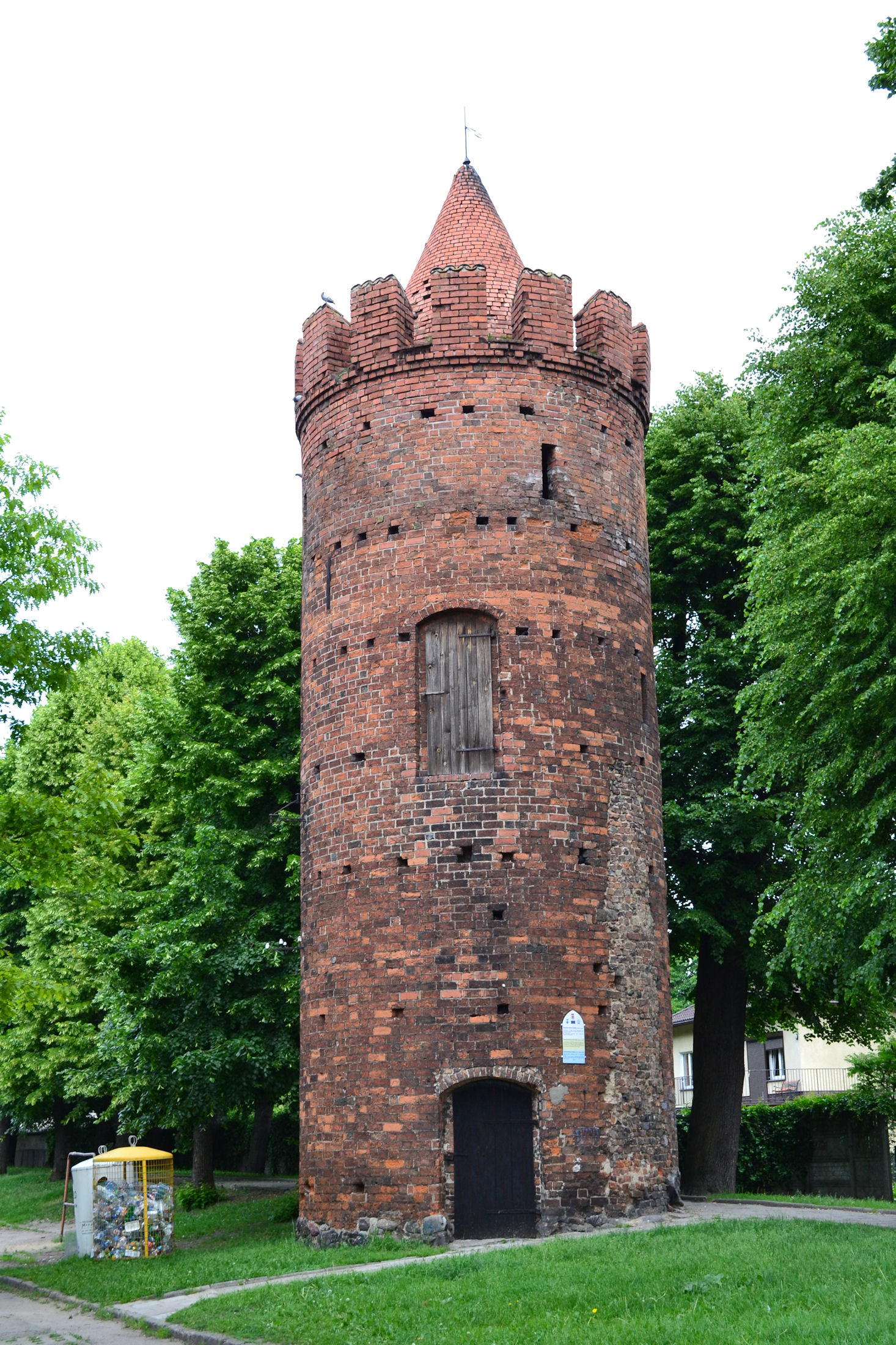 Myślibórz - Baszta Prochowa